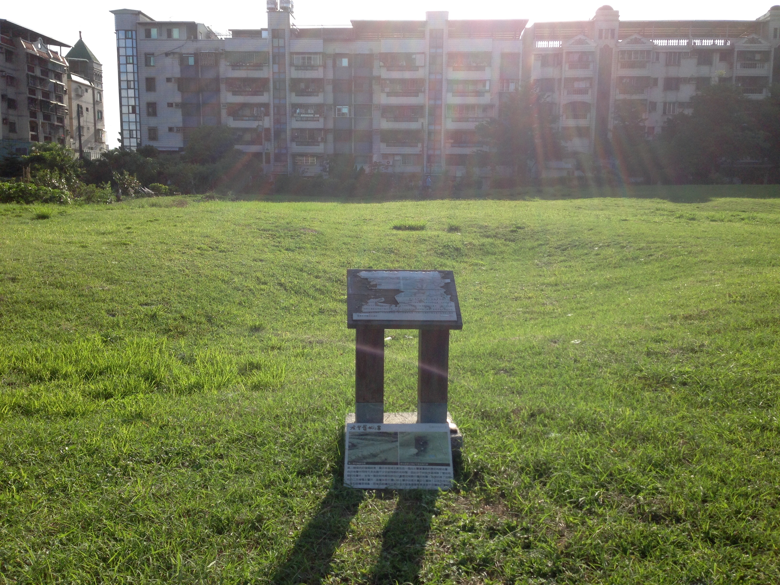 鳳山縣舊城遺址保存區